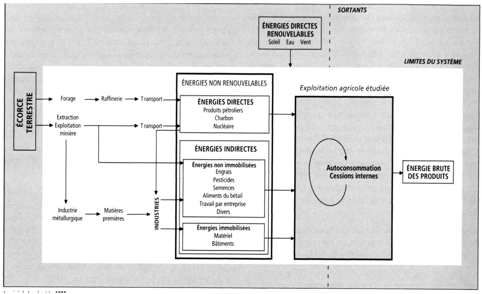 Illustre le système considéré dans le bilan énergétique de la ferme